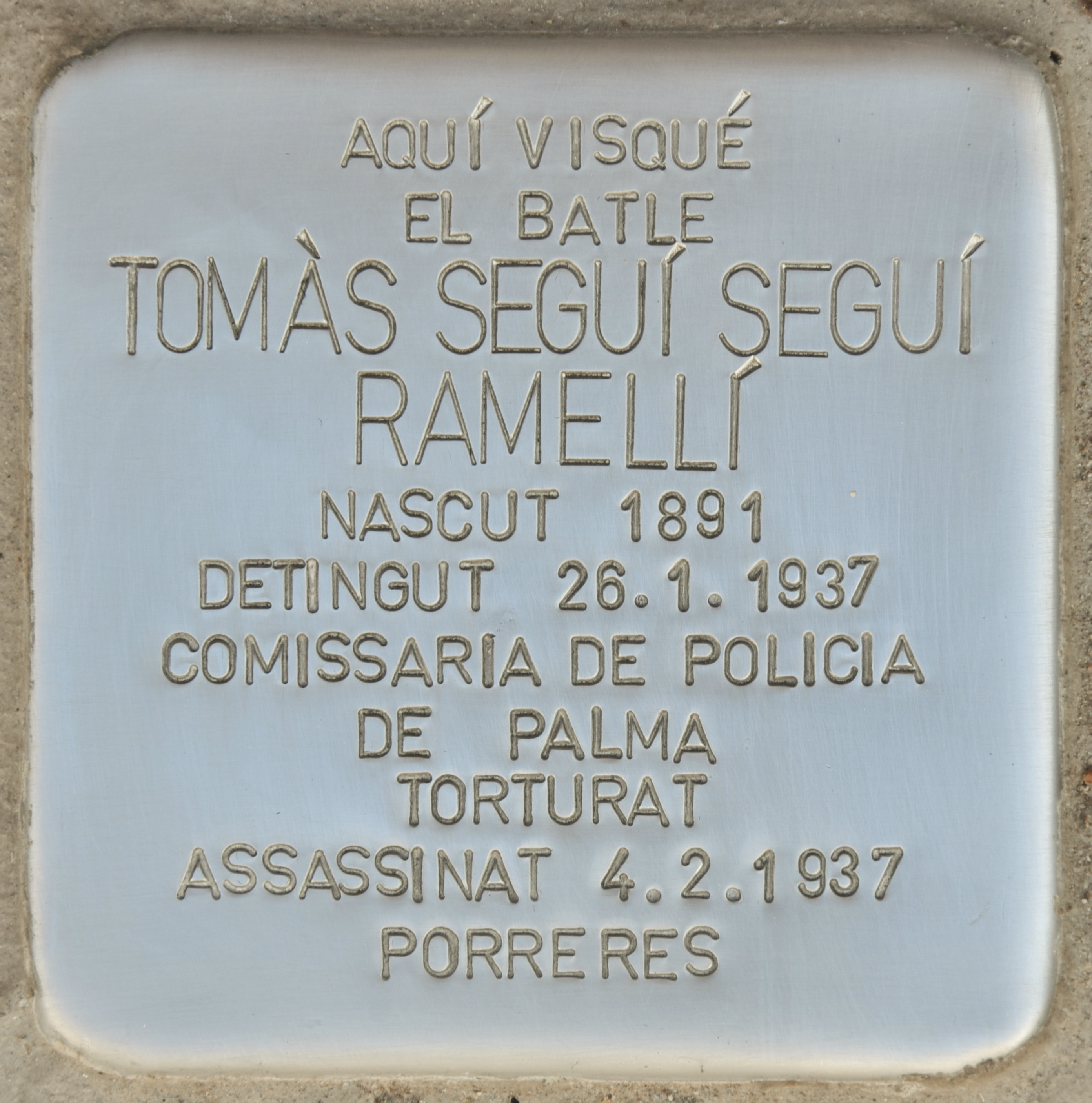 Remembrance Stone für Tomas Segui Segui Ramelli